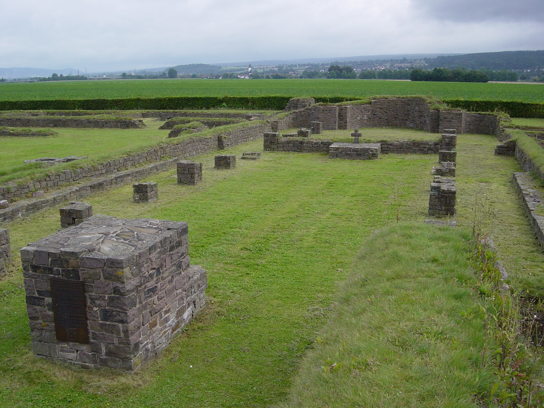 ehemalige Benediktinerpropstei "tom Roden" in Höxter (Deutschland)